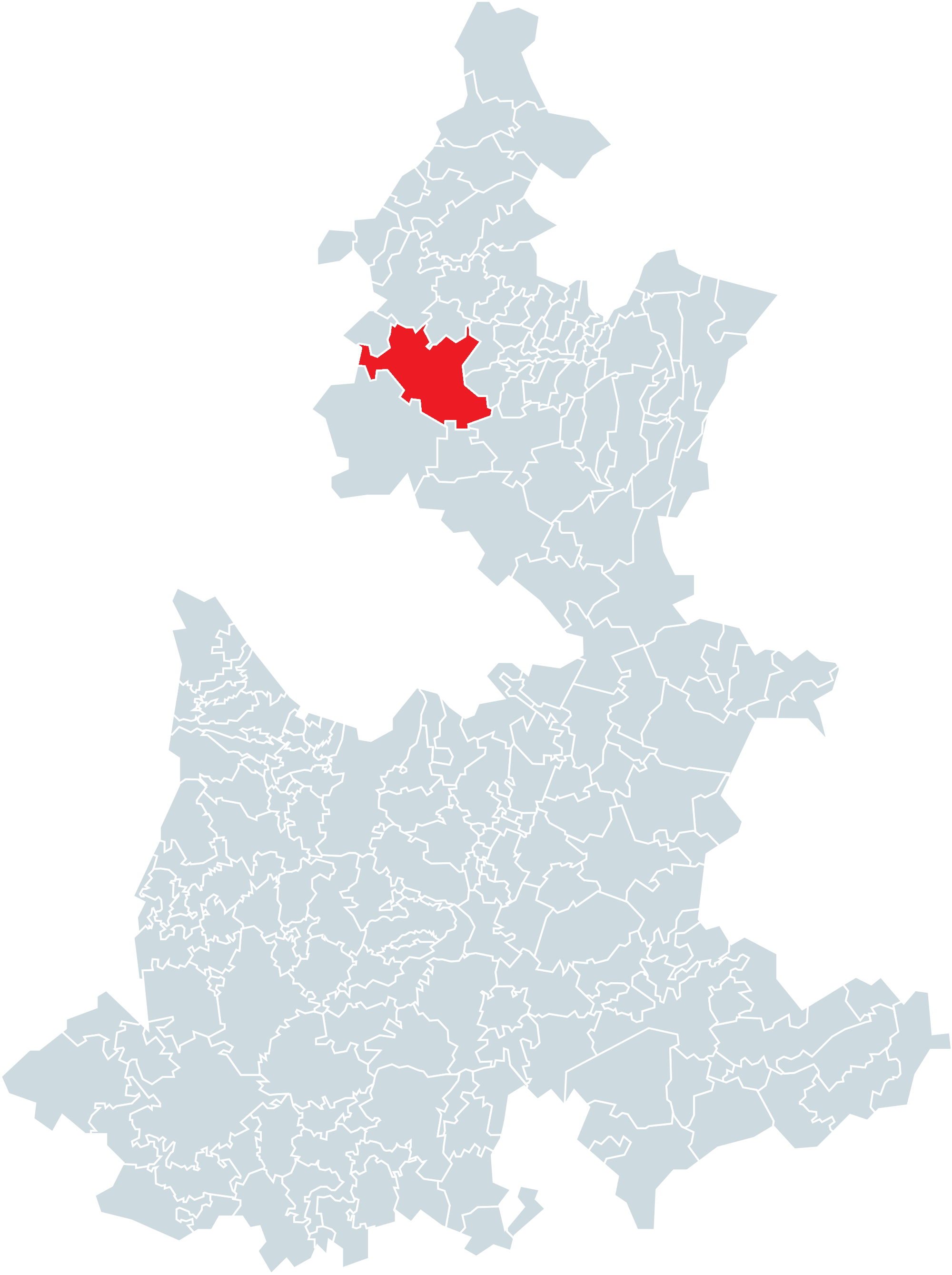 Municipio de Zacatlán